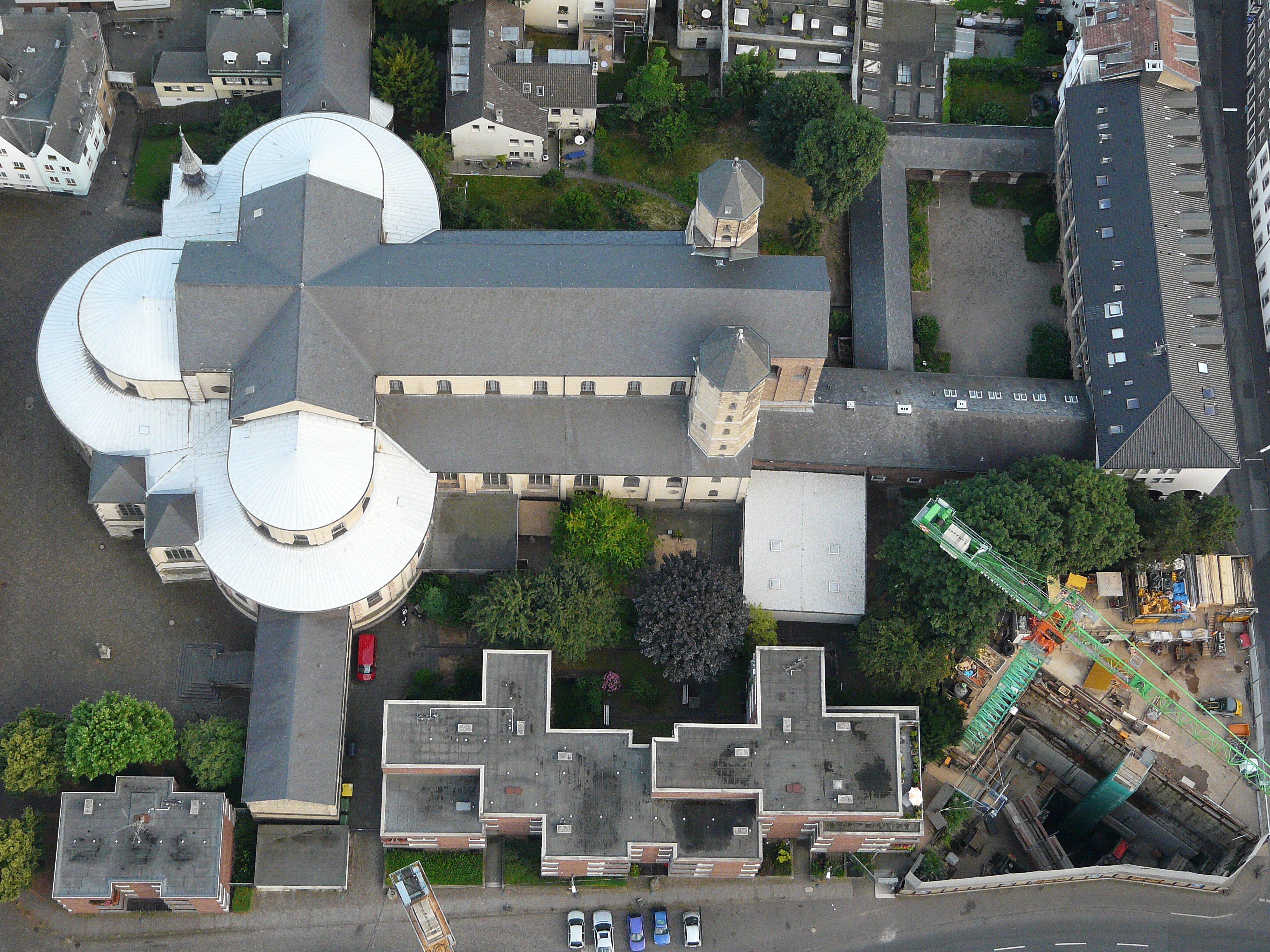 Sankt Maria im Kapitol in Köln